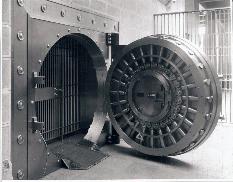 Boveda principal